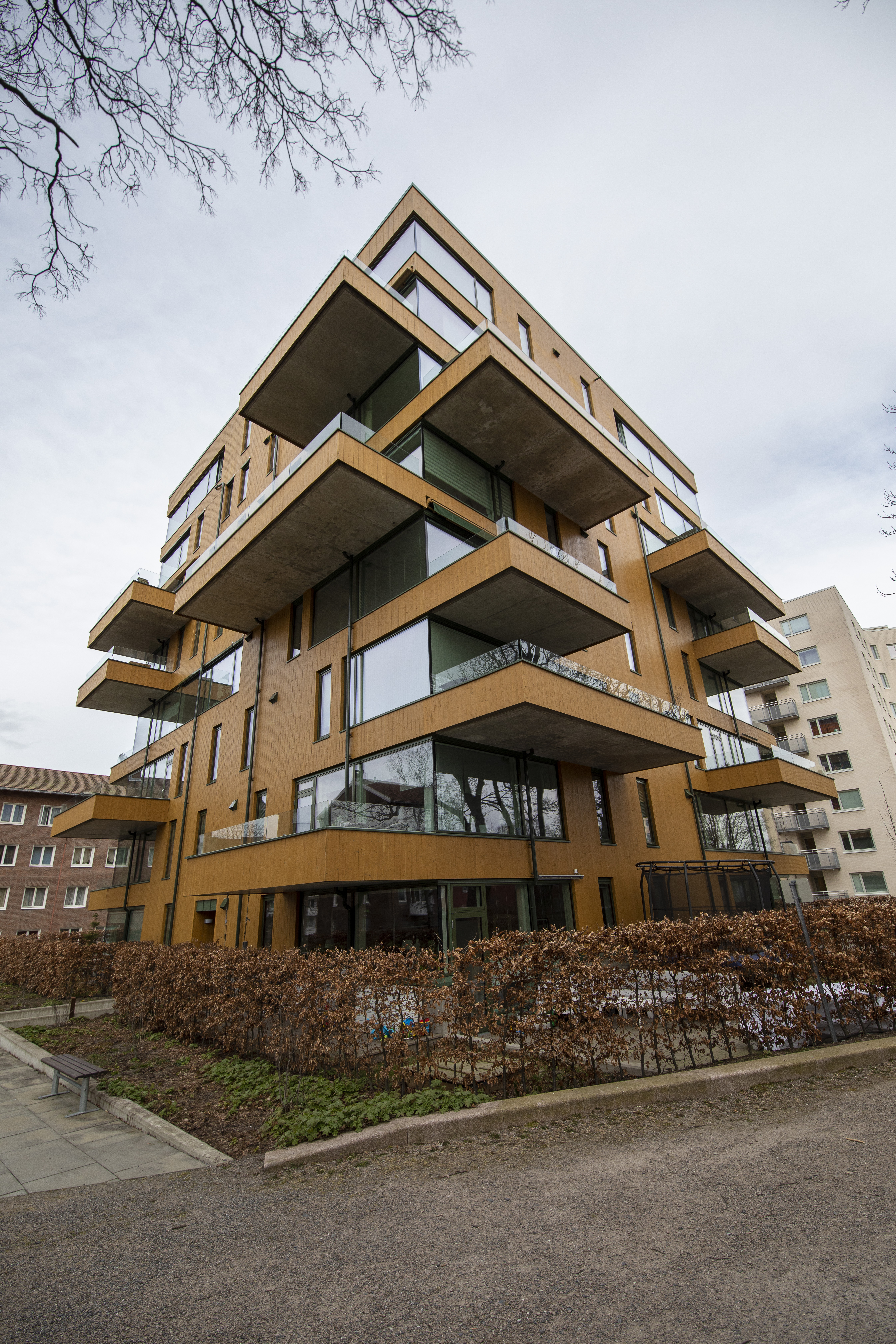 Boligblokken Ullevål tårn med adresse Nedre Ullevål 5. Vinner av Oslo Bys arkitekturpris 2016.